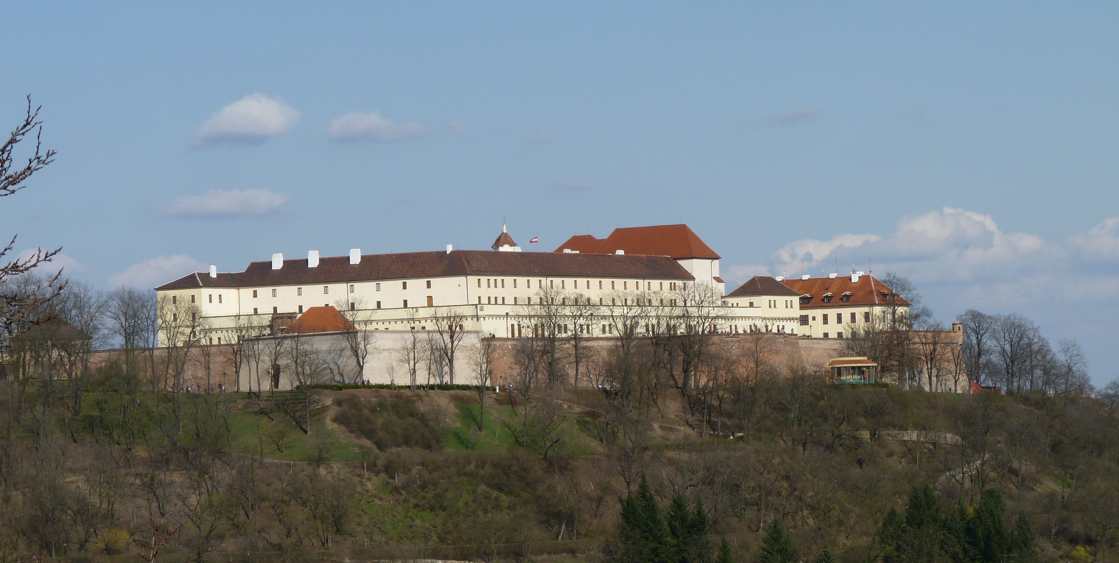 Špilberk od Žlutého kopce, Brno